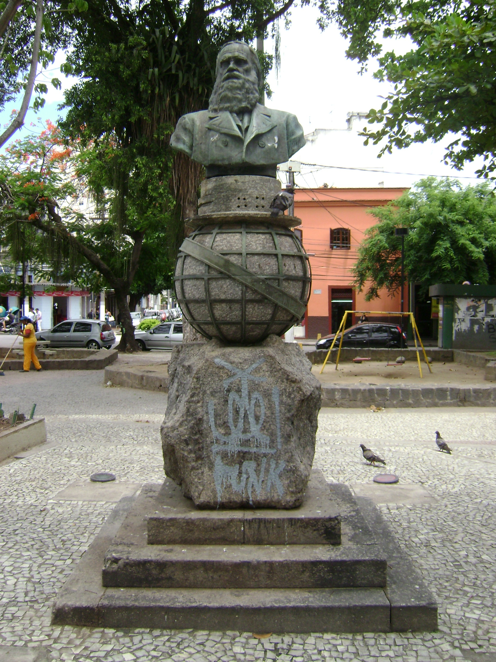 Estátua em praça de Niterói, Rio de Janeiro, Brasil.